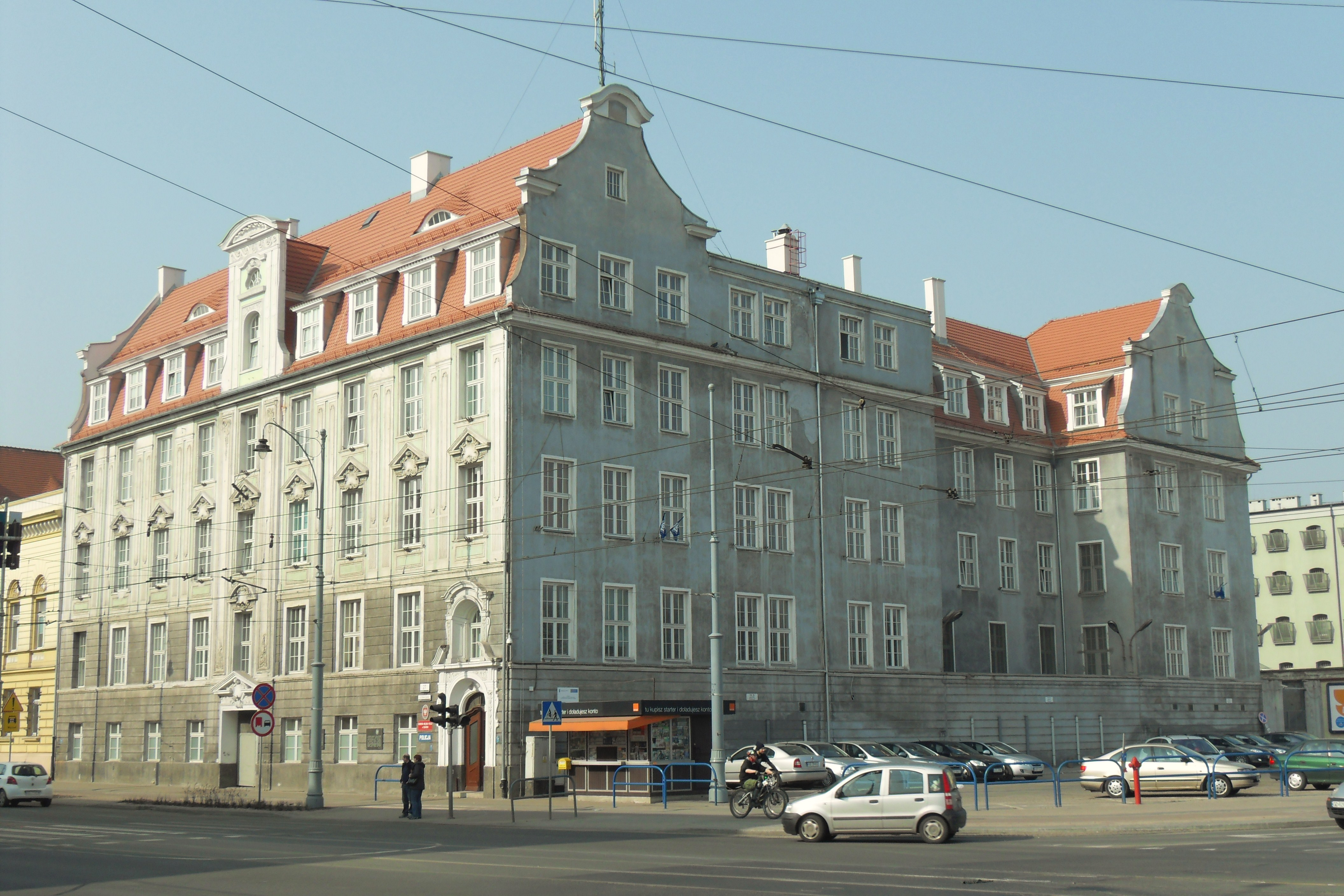 Gdańsk Śródmieście, ul. Nowe Ogrody 27.